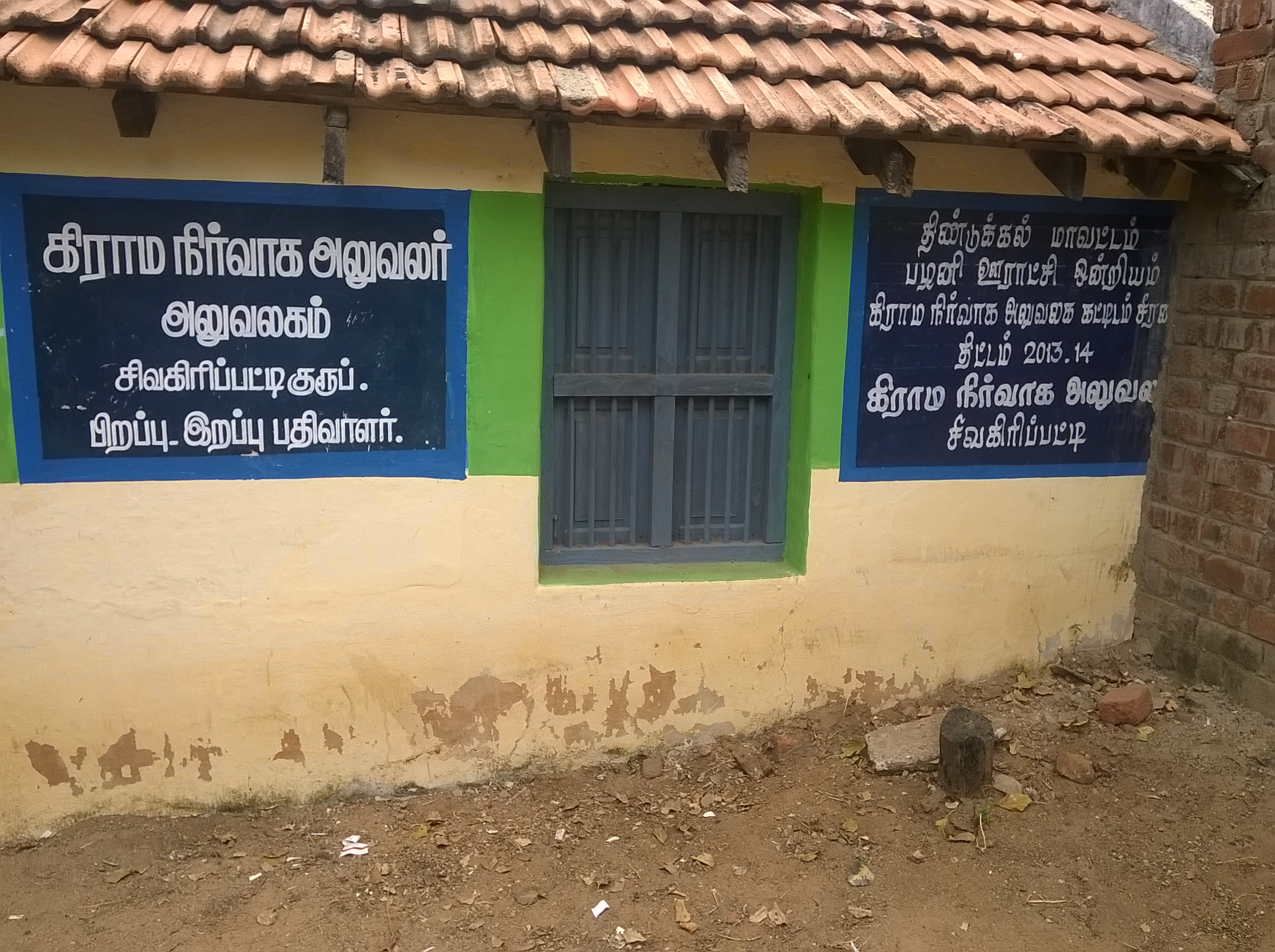 கட்டுரைக்கு